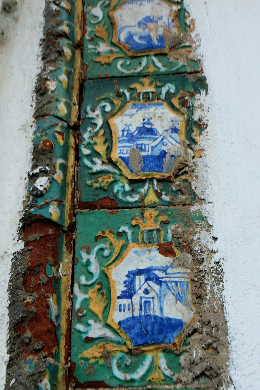 Церковь Покрова Богородицы в селе Великом Ярославской области. Оформление алтарных окон цветными изразцами с вставками.